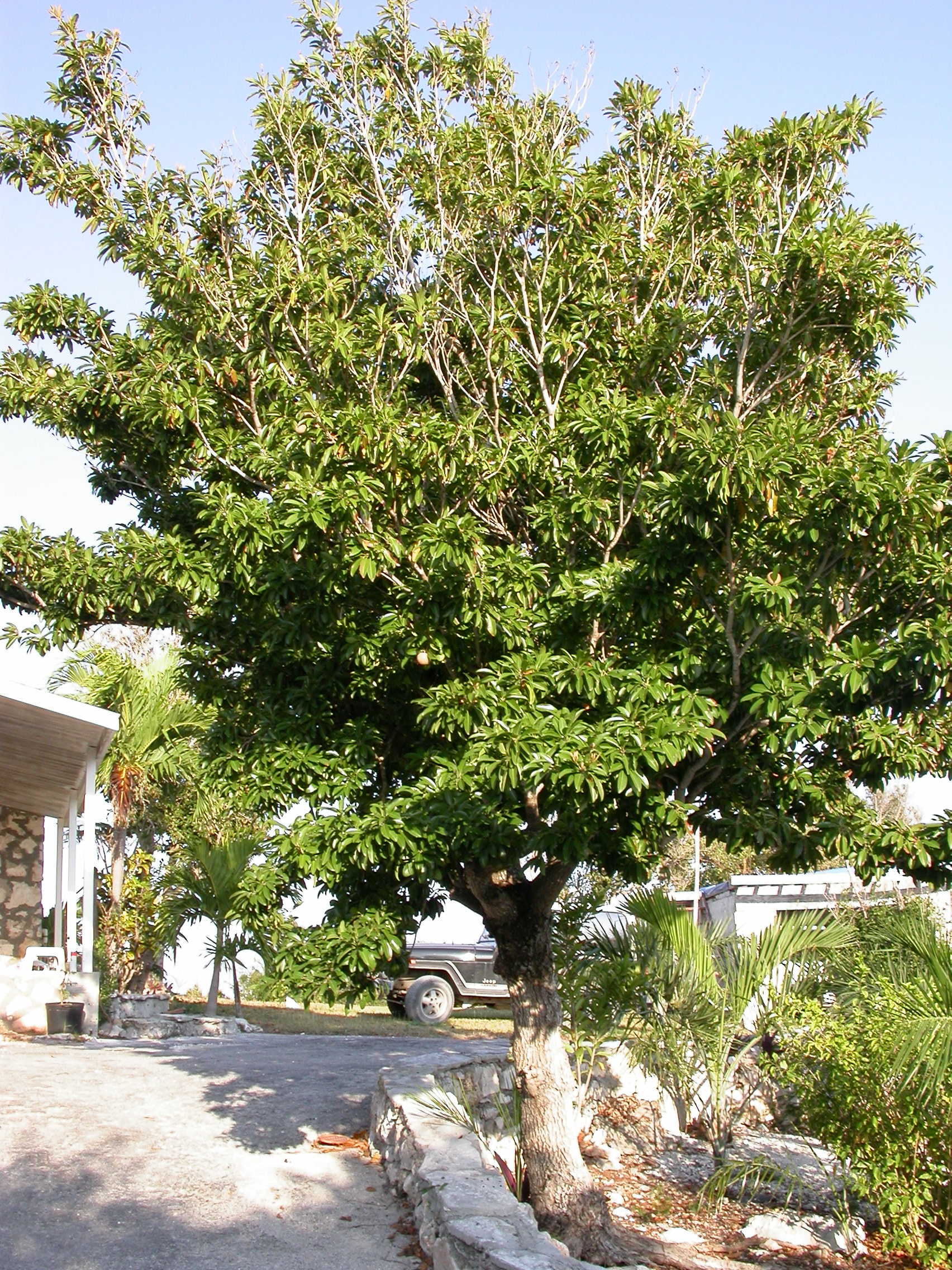 Sapodilla (Manilkara zapota) tree. Photograph taken by myself.